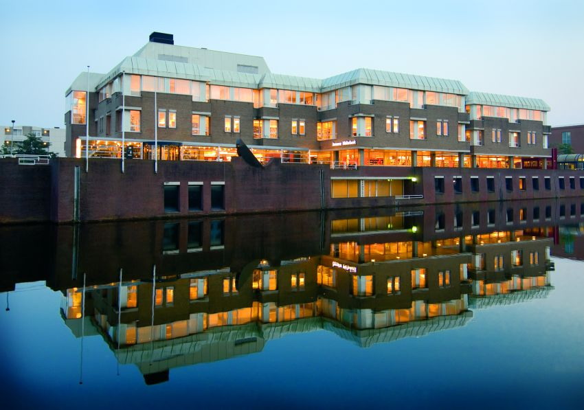 Speciaal voor lemma Wikipedia beschikbaar gesteld door S. Beth, P.R.-medewerker van de Zeeuwse Bibliotheek, januari 2007 Public library, Middelburg, the Netherlands